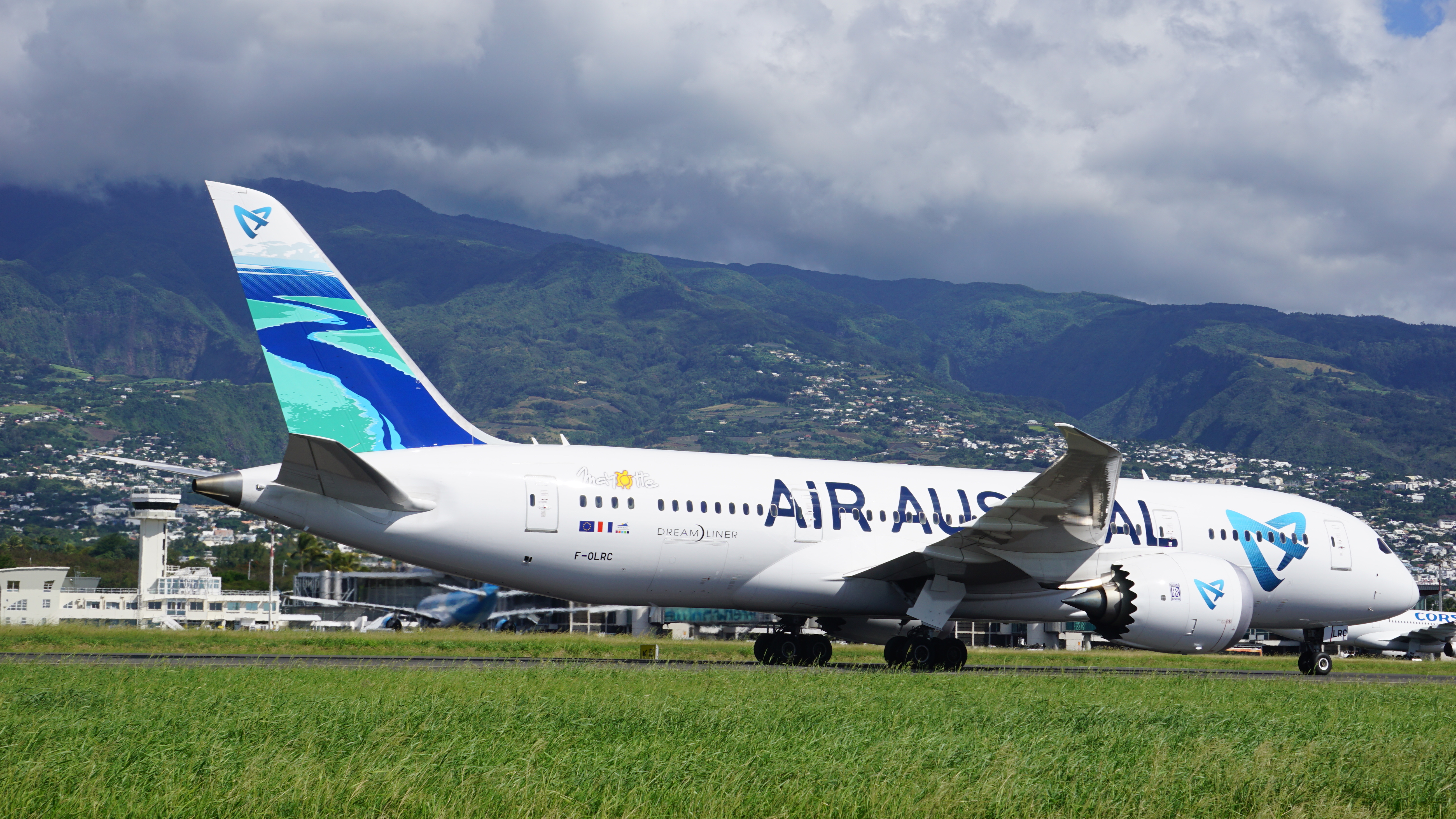 Attérissage du dremaliner à Gillot ( île de la Réunion).